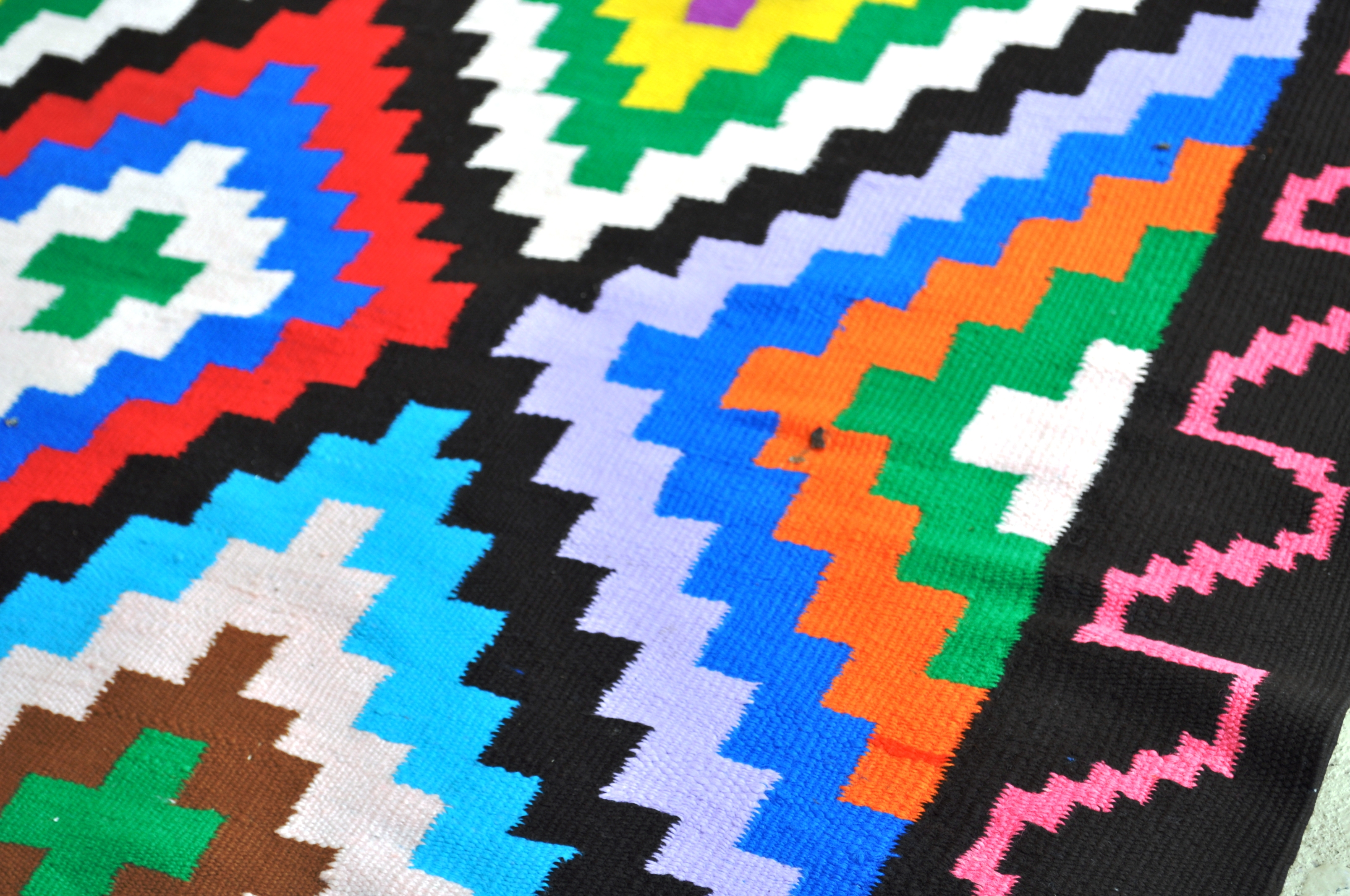 Margoum This is an image of Cultural Fashion or Adornment from Tunisia